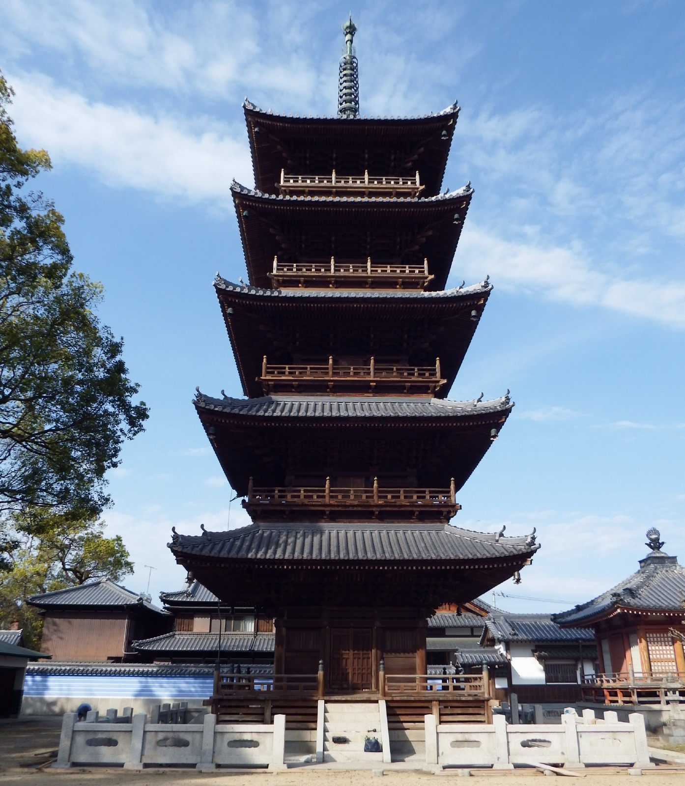 本山寺の五重塔